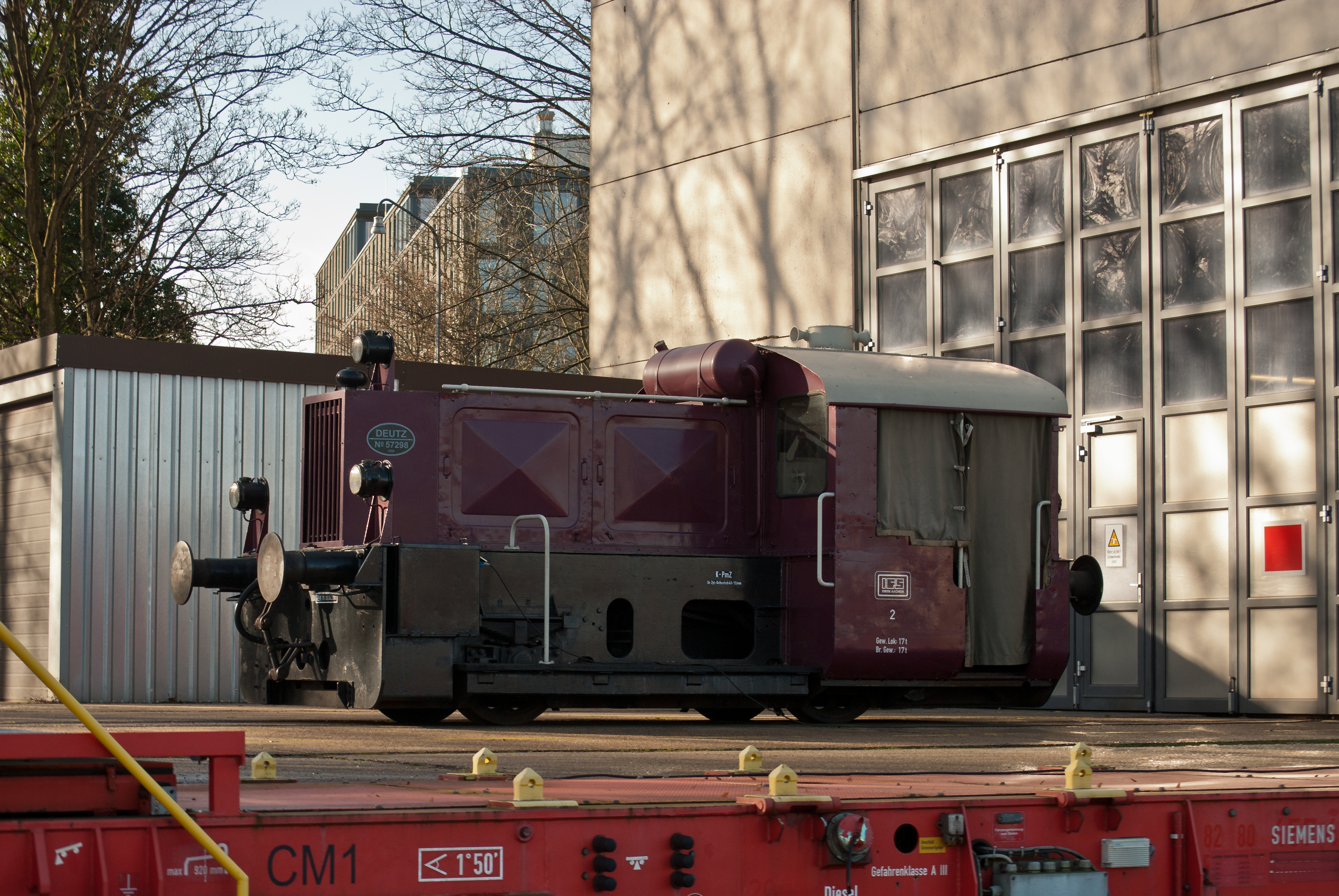 Die Köf II des Instituts für Schienenfahrzeuge und Fördertechnik der RWTH Aachen, abgestellt auf dem Institutsgelände am Bahnhof Aachen West